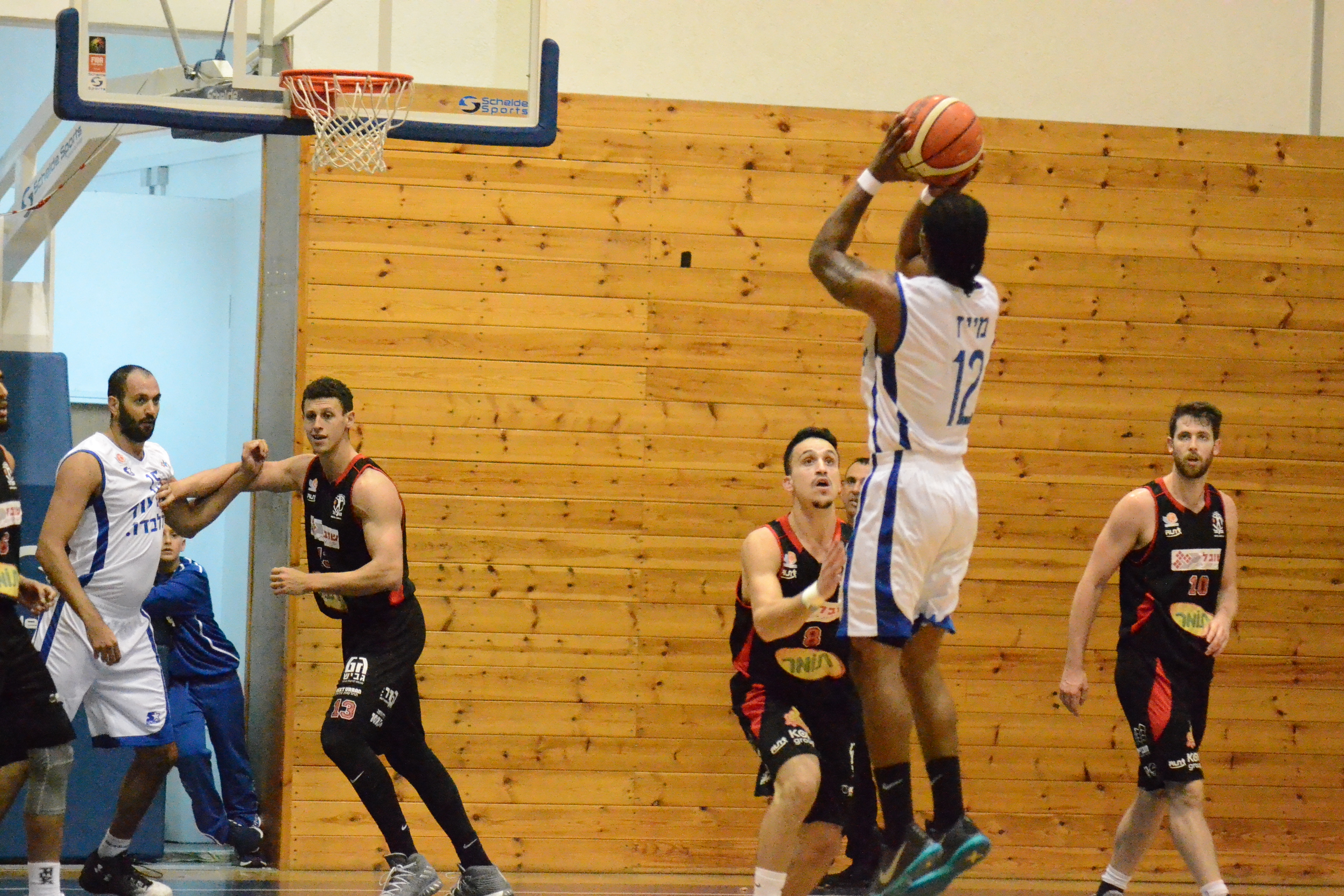 קדריק מייז (בלבן ) קולע שלשה במשחק באולם אלון בקריית גת,2017